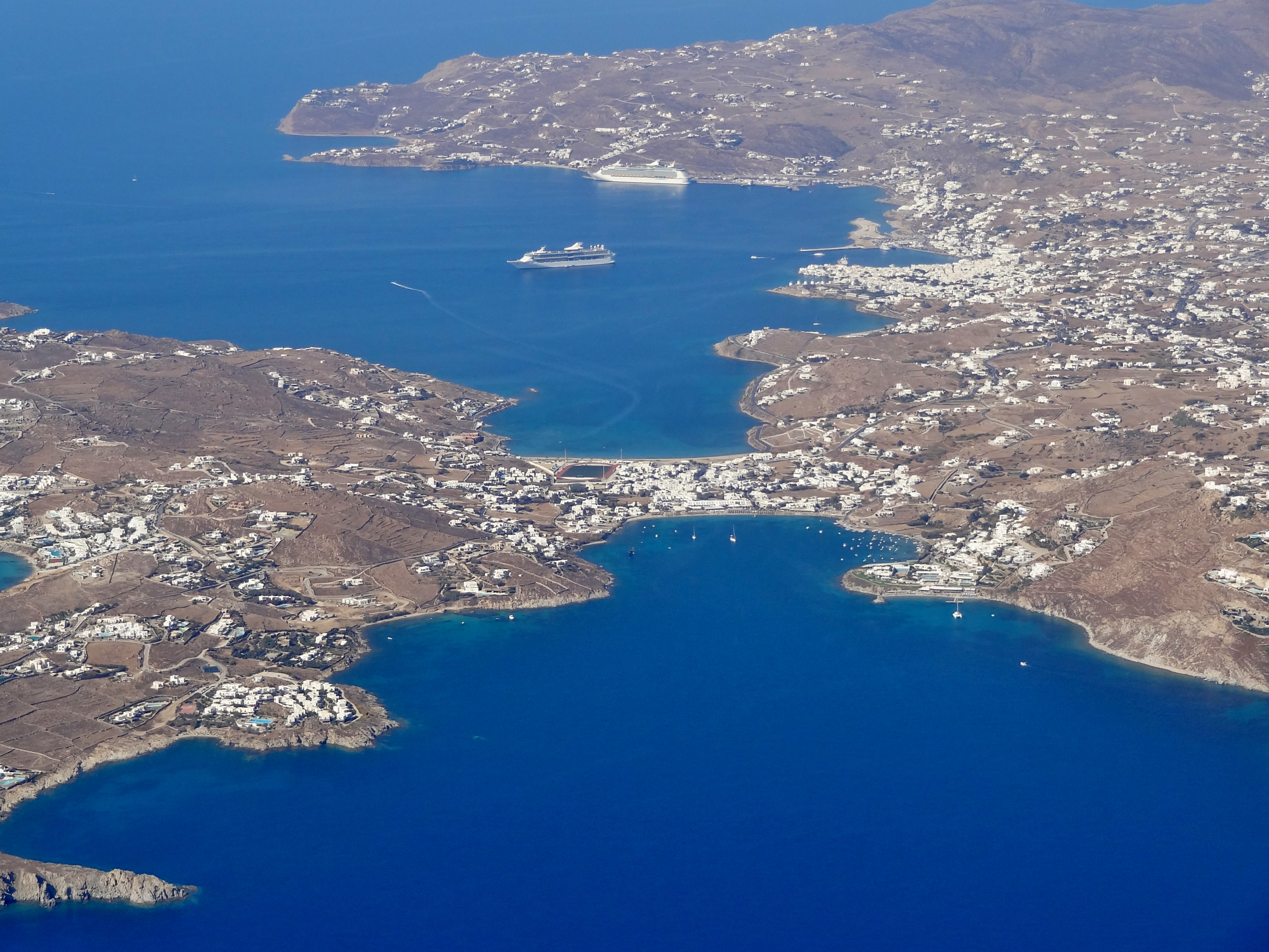 Luftbild von Ornos auf Mykonos, Kykladen, Griechenland